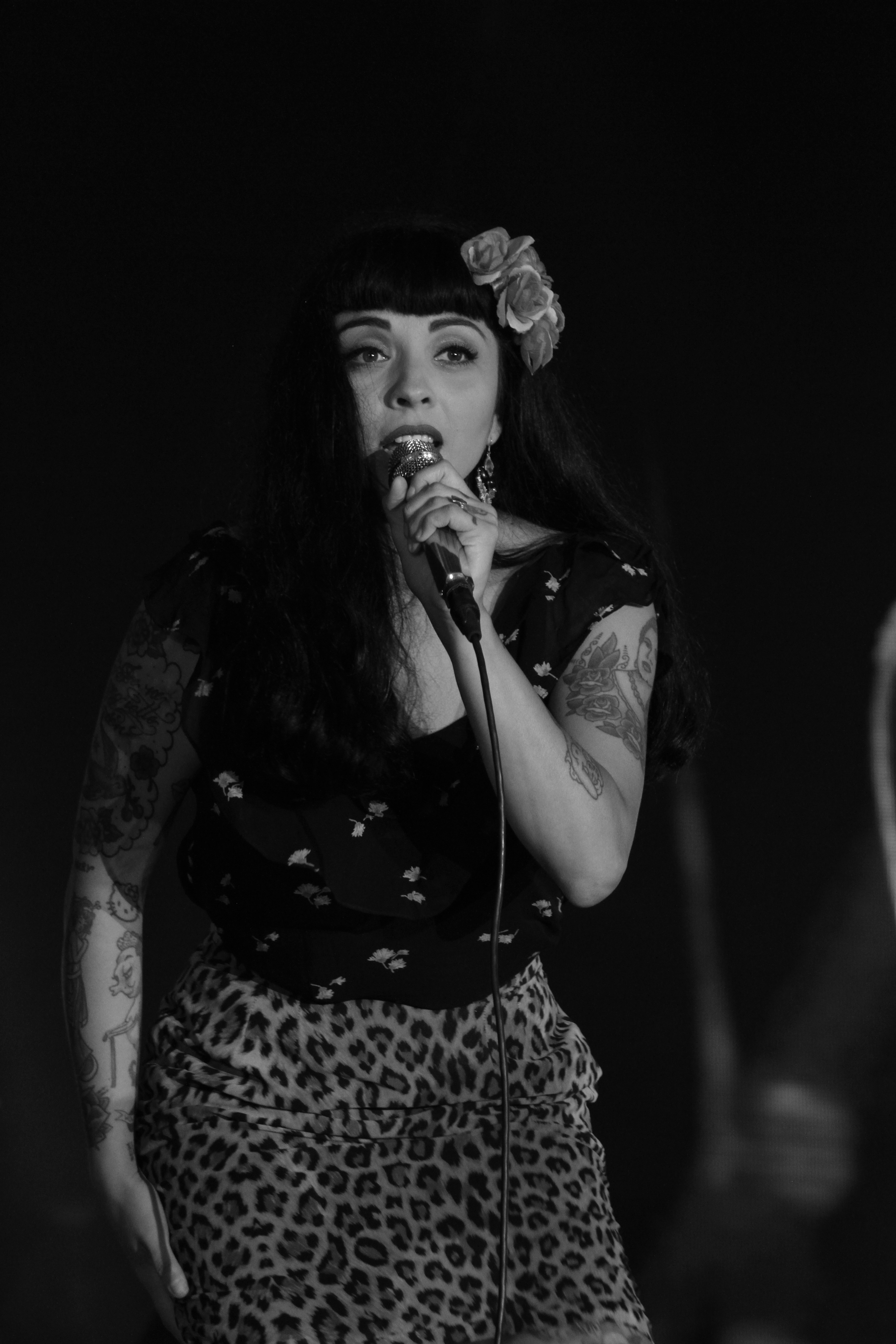 Mon Laferte en Querétaro, 2016.